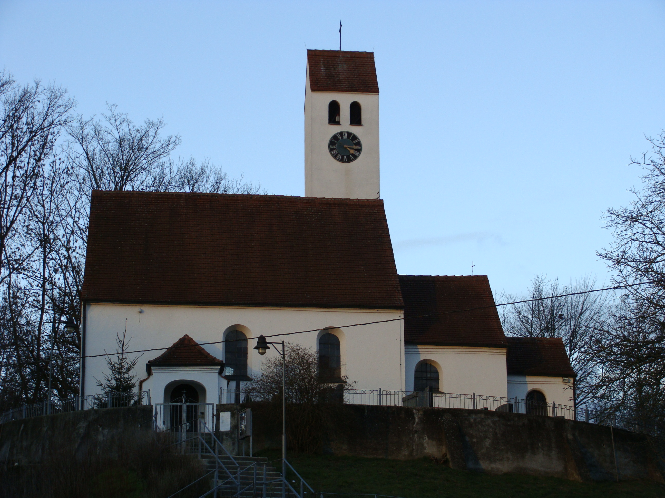 Katholische Filialkirche St. Maria Magdalena